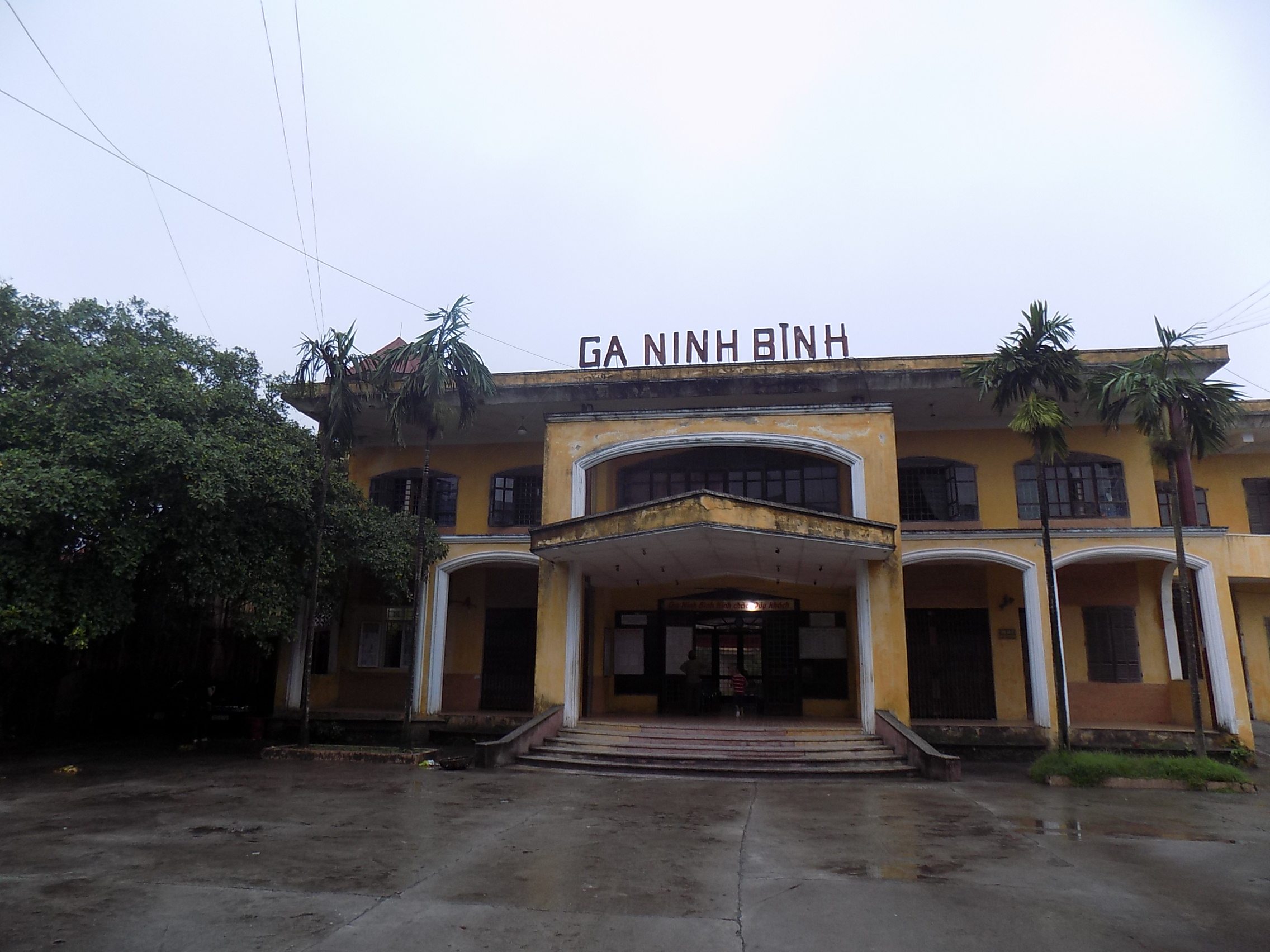 Gare de Ninh Bình au Vietnam